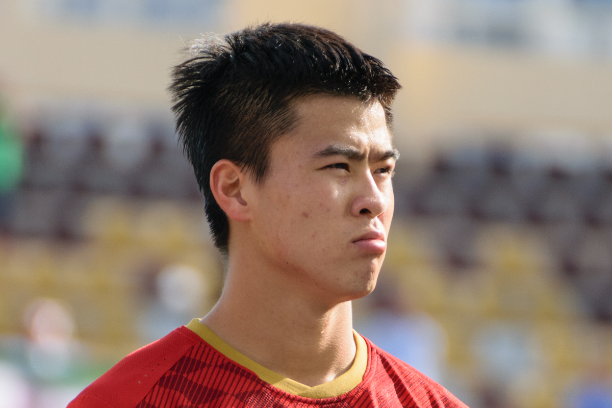 Đỗ Duy Mạnh at the Asian Cup 2019